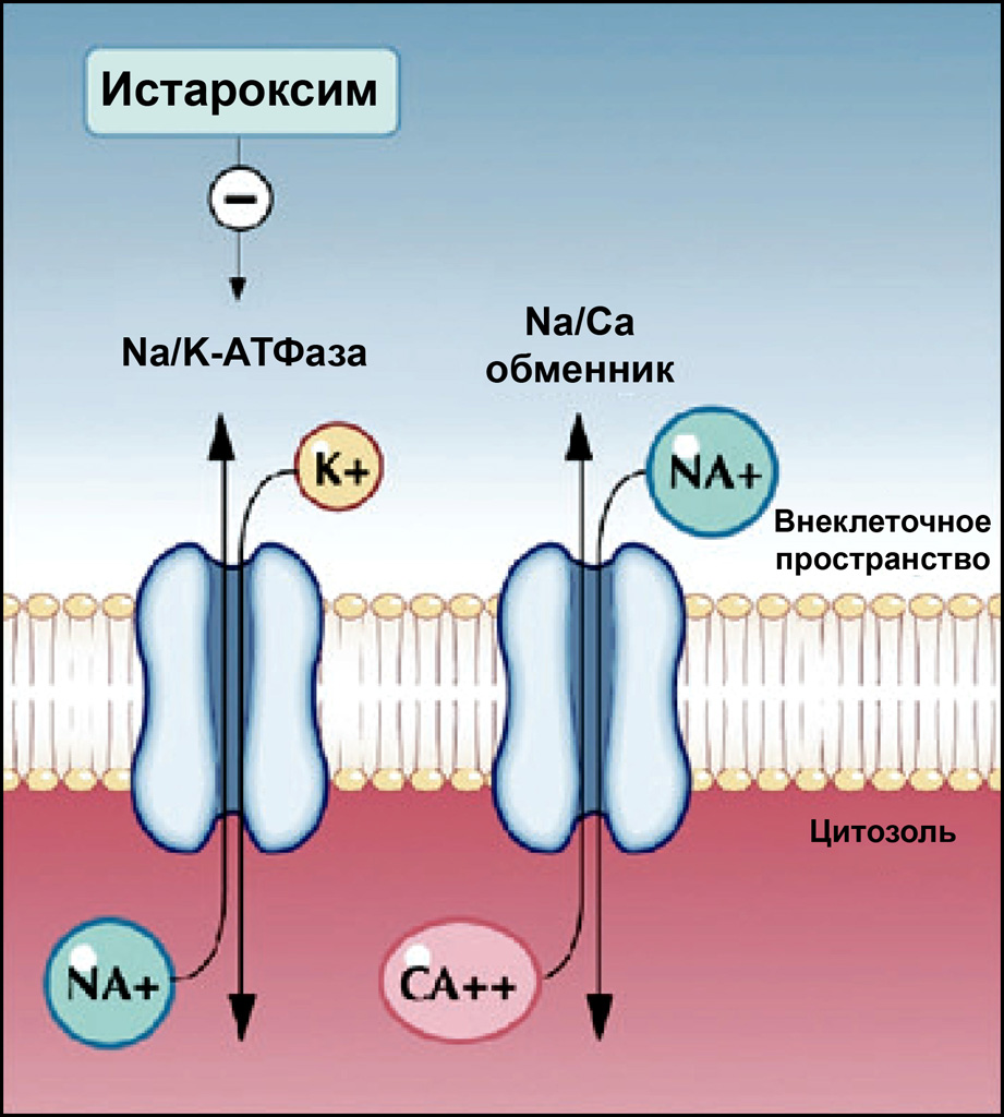 Влияние истароксима на внутриклеточный обмен кальция в кардиомиоците.